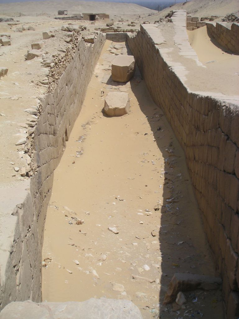 Fosses à barques du temple funéraire d'Ounas à Saqqarah - Ve dynastie